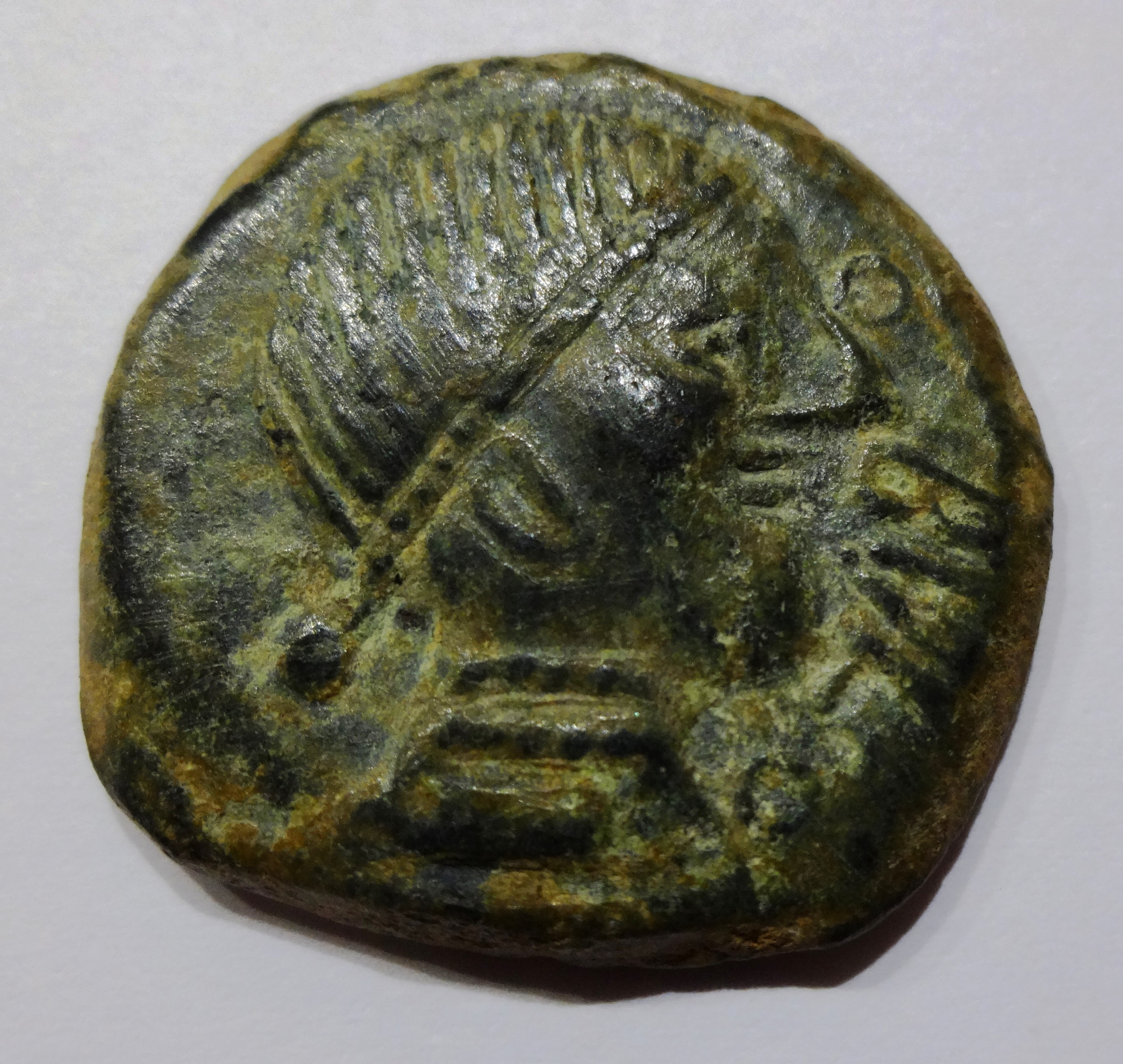 keltisches As (Bronzemünze) aus Obulco (Südspanien), Vorderseite, um 100 v. Chr.